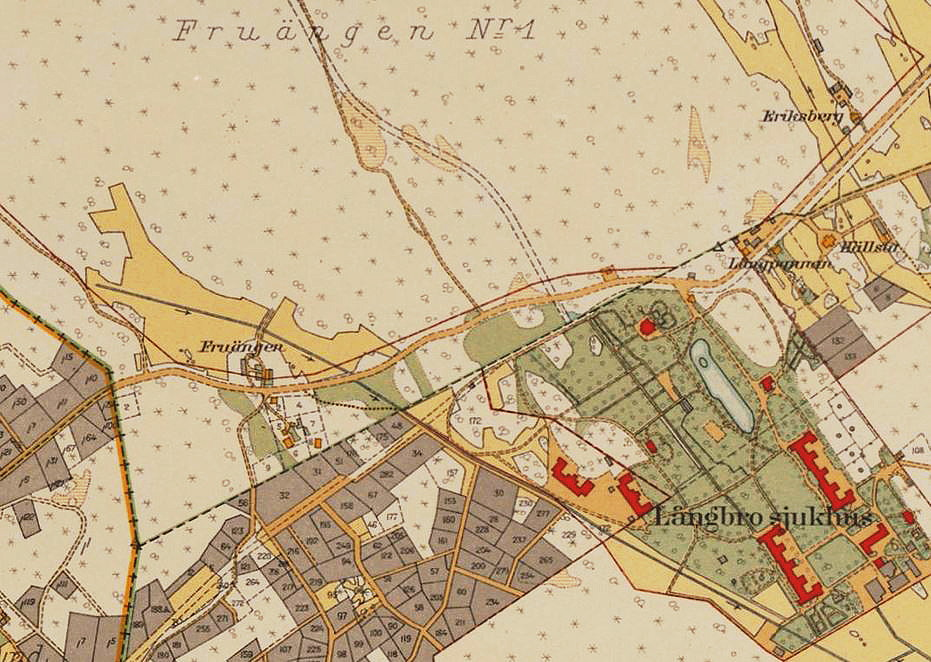 1934 års karta över Stockholm med omgivningar med del som visar Fruängen och Långbro sjukhus